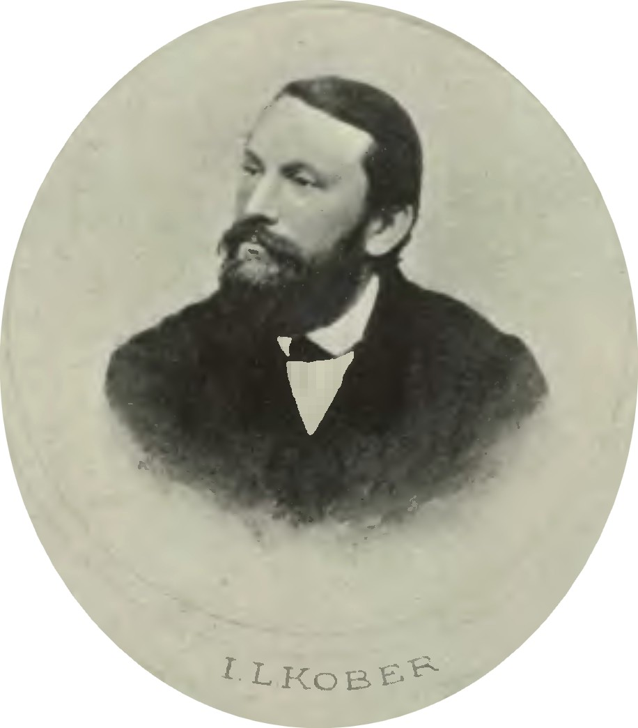 Portrét – Ignác Leopold Kober (1825 - 1866), Český nakladatel a tiskař.